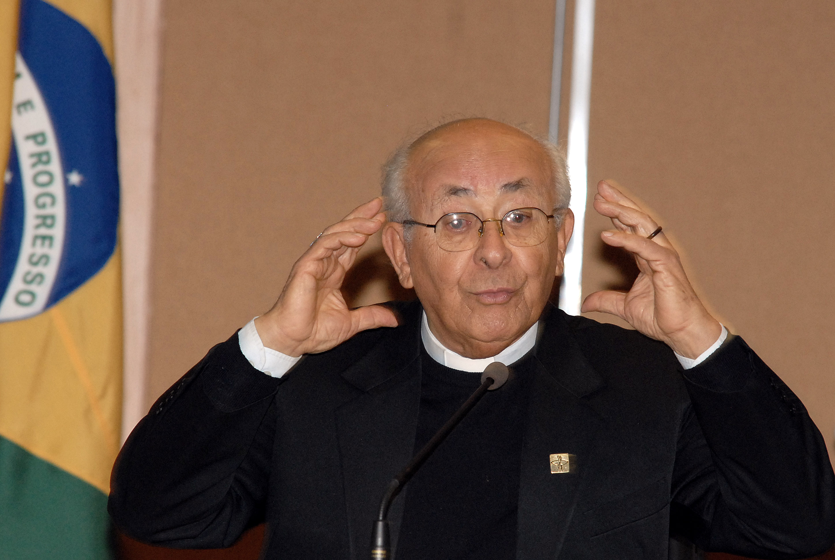 Dom Tomás Balduíno, bispo católico brasileiro